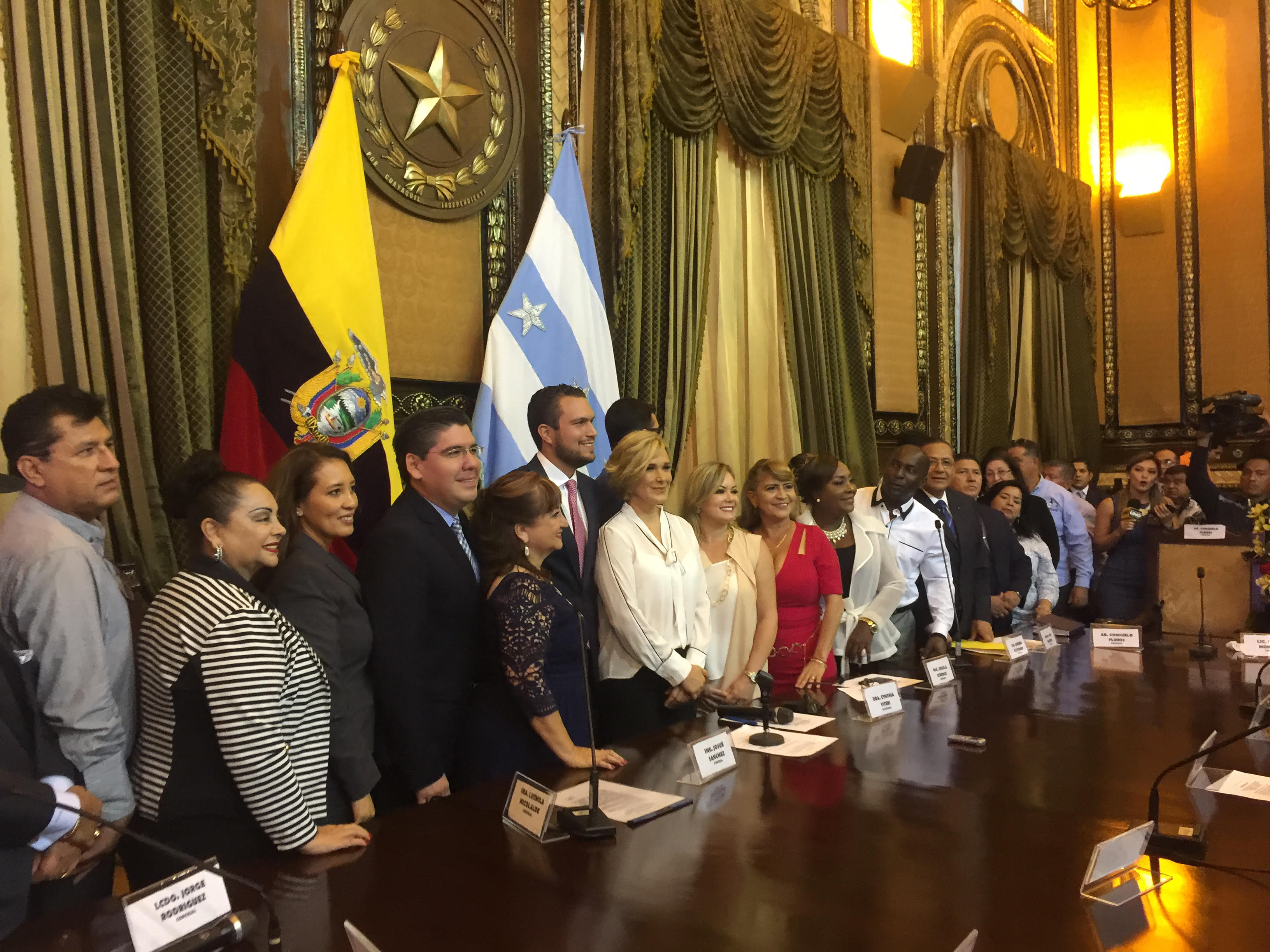 Sesión Inaugural del Concejo Municipal de Guayaquil 2019 -2023